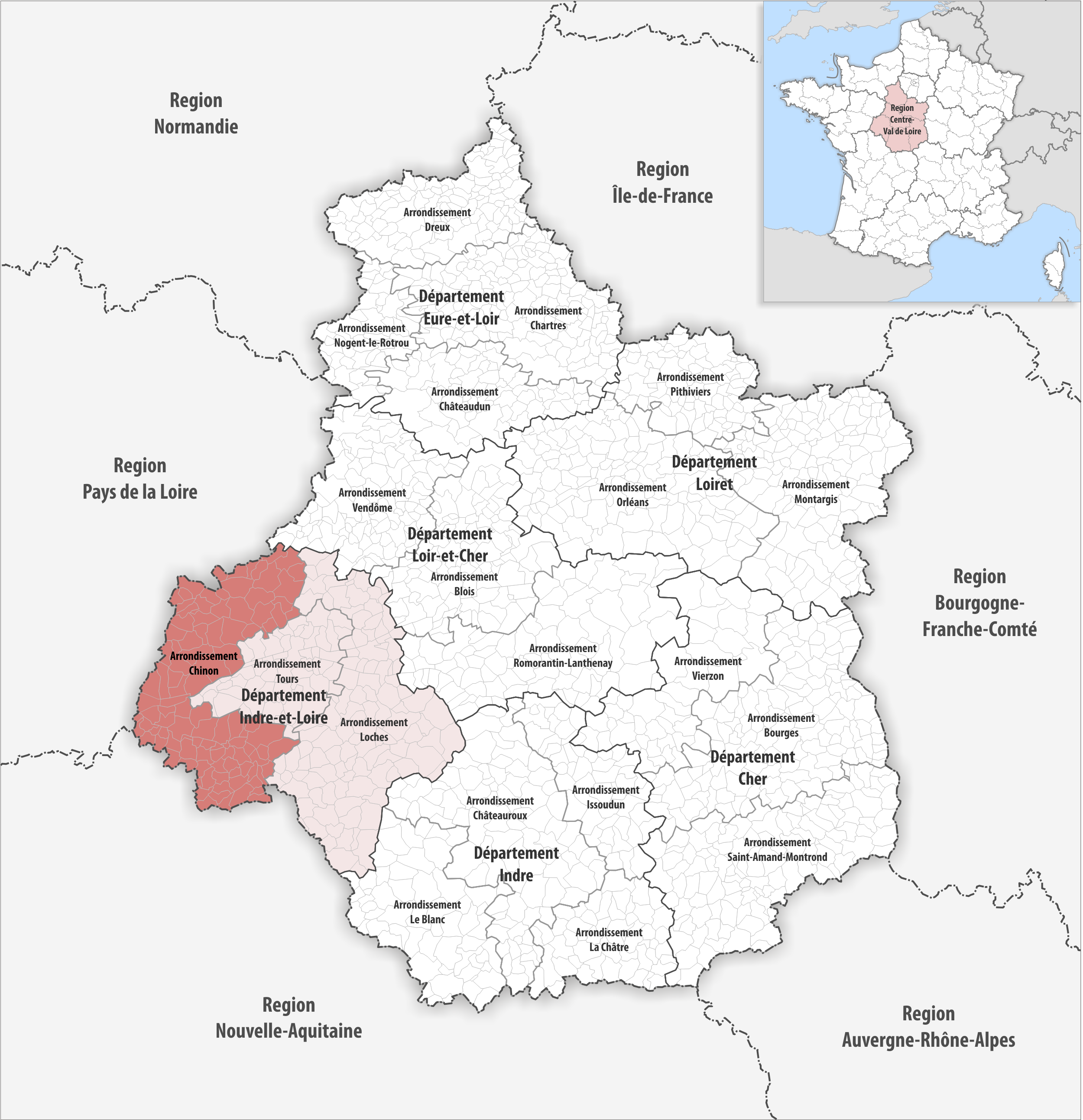 Lage des Arrondissements Chinon